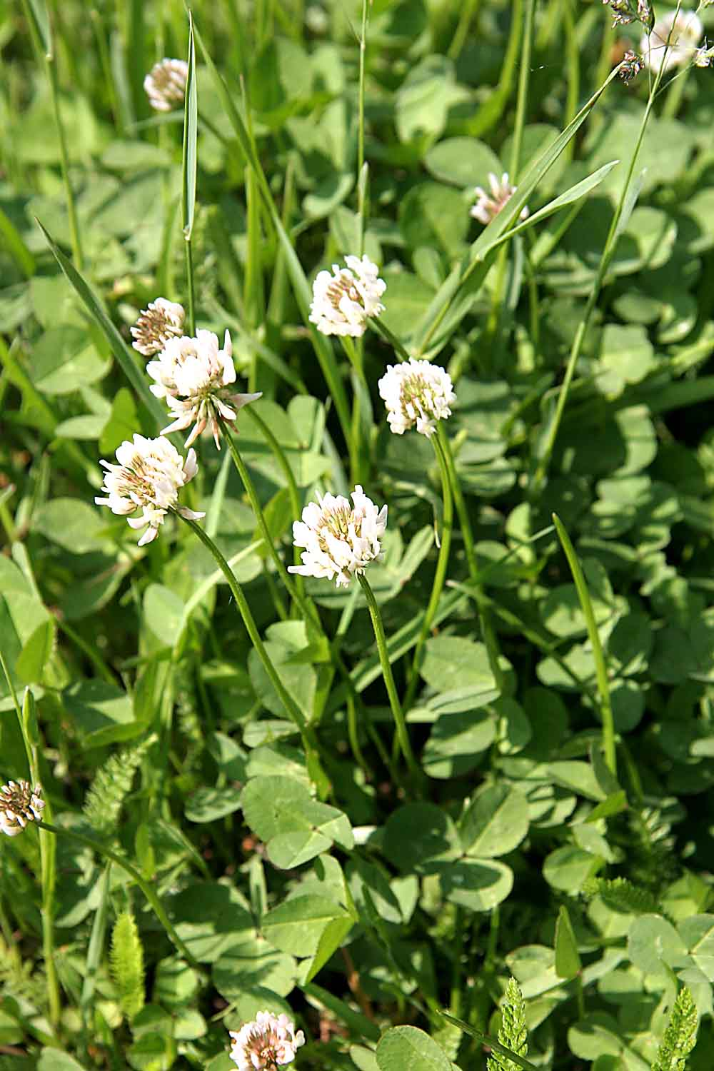 Trifolium repens autor:Prazak